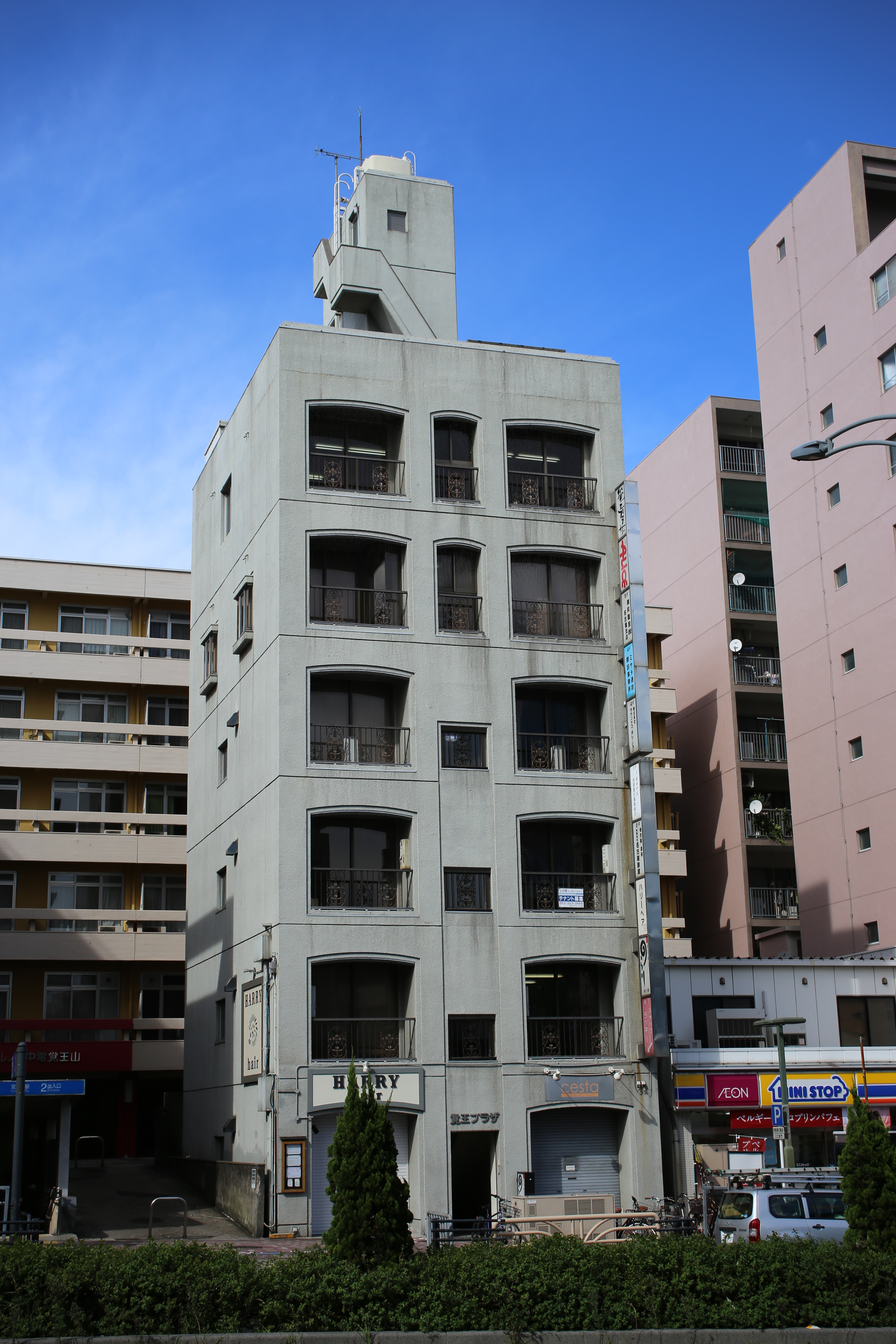 名古屋市千種区末盛通の覚王プラザを南側公道西側より撮影